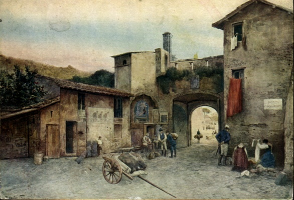 Porta Cavalleggeri in Rome (rione Borgo)